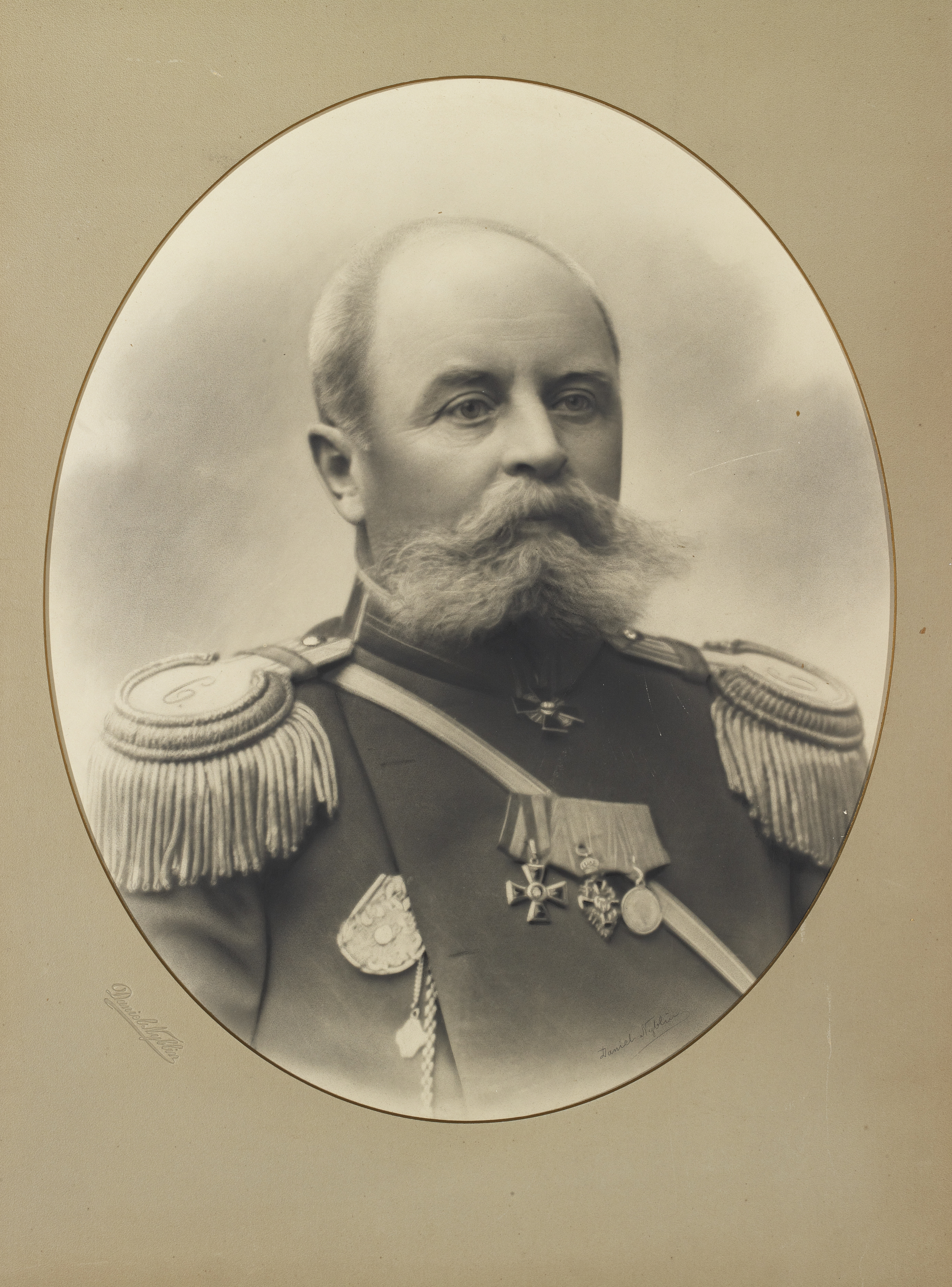 Eversti Alexander Raimund Thuring. Pysty, mustavalkoinen, pahvikehykset 69 x 48 cm.